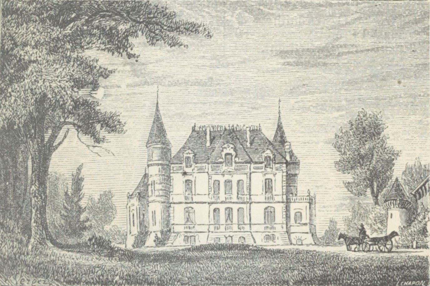 Illustration du Château de Rayne-Vigneau dans l'ouvrage Bordeaux et ses vins (7ème édition) de Charles Cocks et Edouard Féret publié en 1898